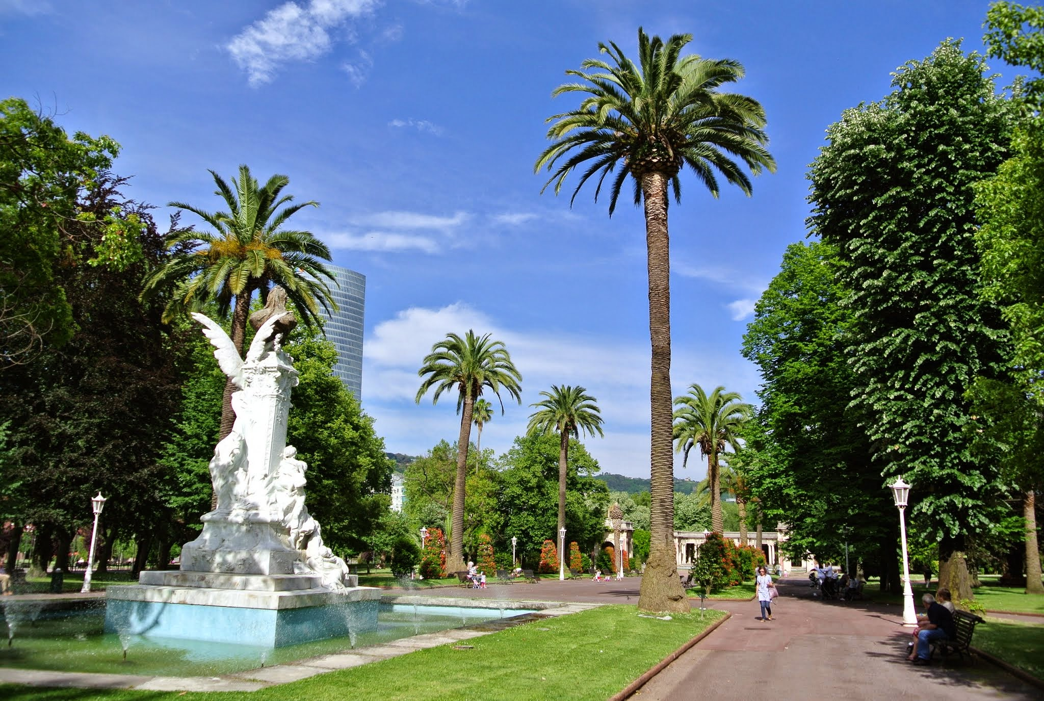 Deustuko San Pedro-Erribera, Bilbo, Bizkaia, Spain